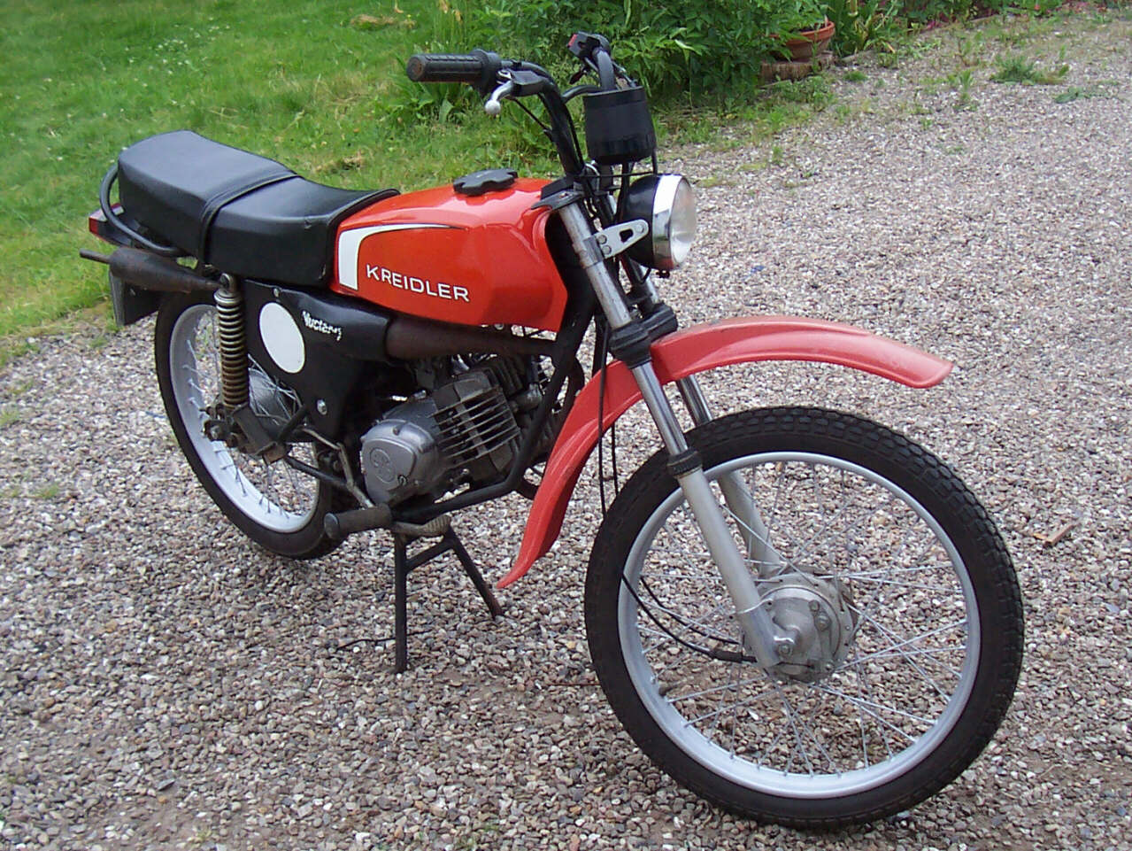 Kreidler-Mustang-Mokick 1981